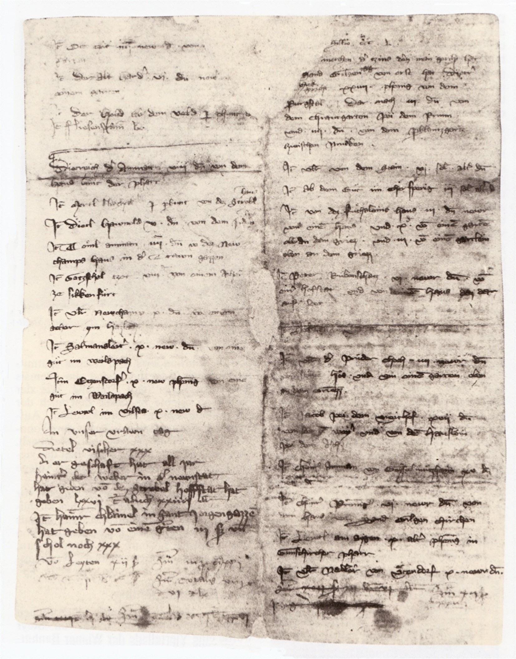 Historische Einnahmenabrechnung des Welser Bruckamtes (1350)